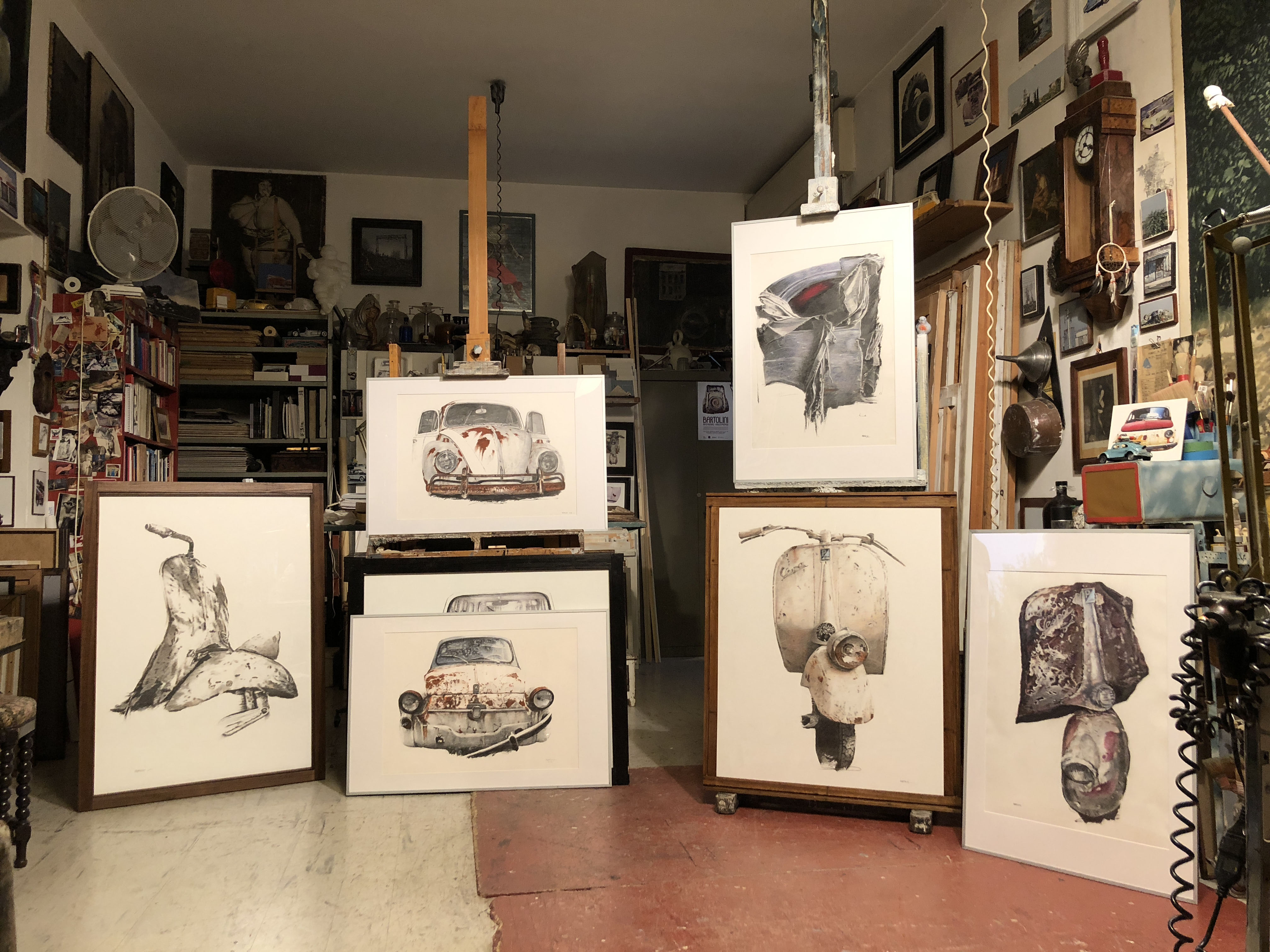 Lo Studio del pittore Giuseppe Bartolini con alcune sue opere. Foto di Bruna Parra